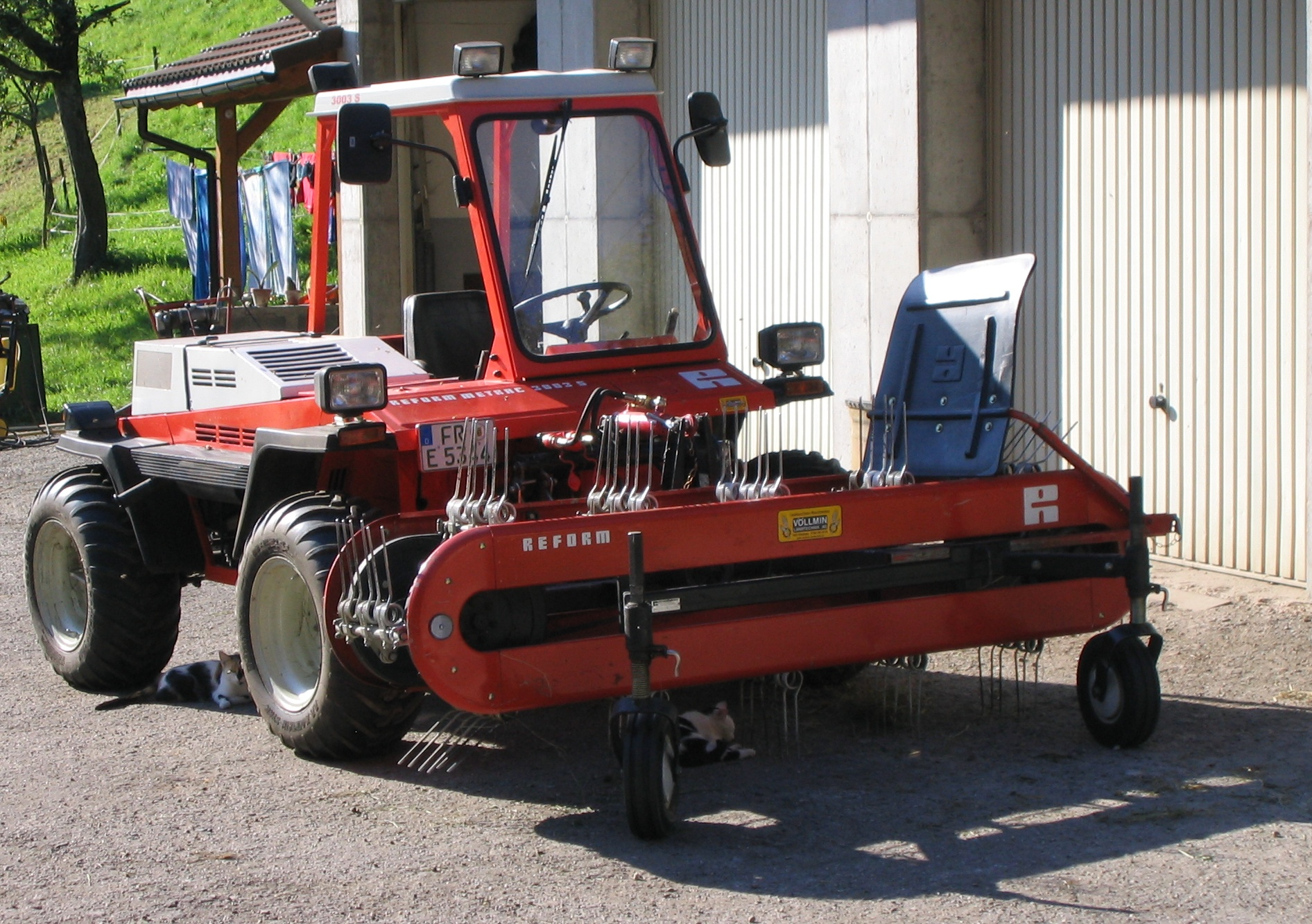 Reform Metrac 2002 S mit Heuwender (Bandrechwender/-schwader)